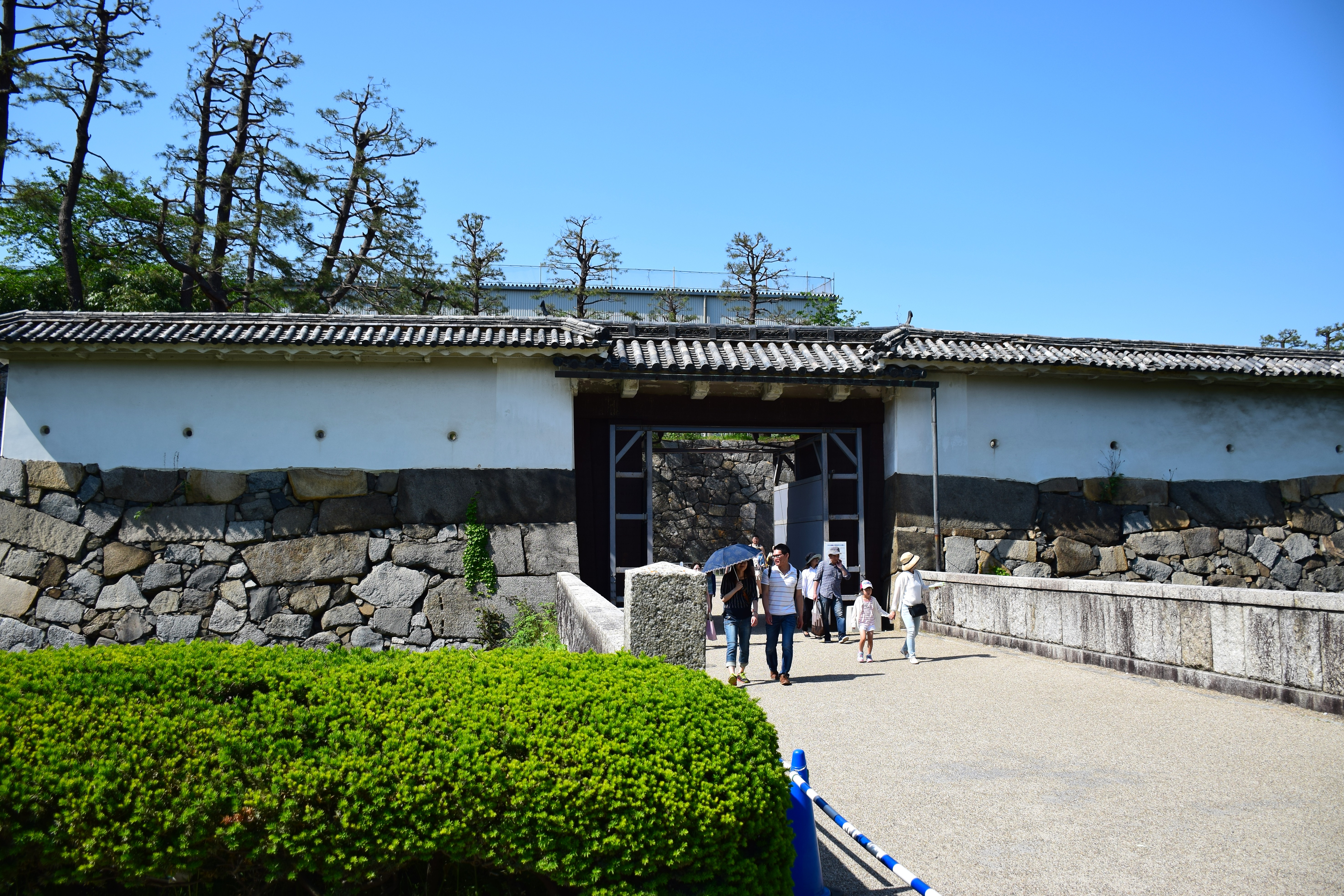 本丸表二之門